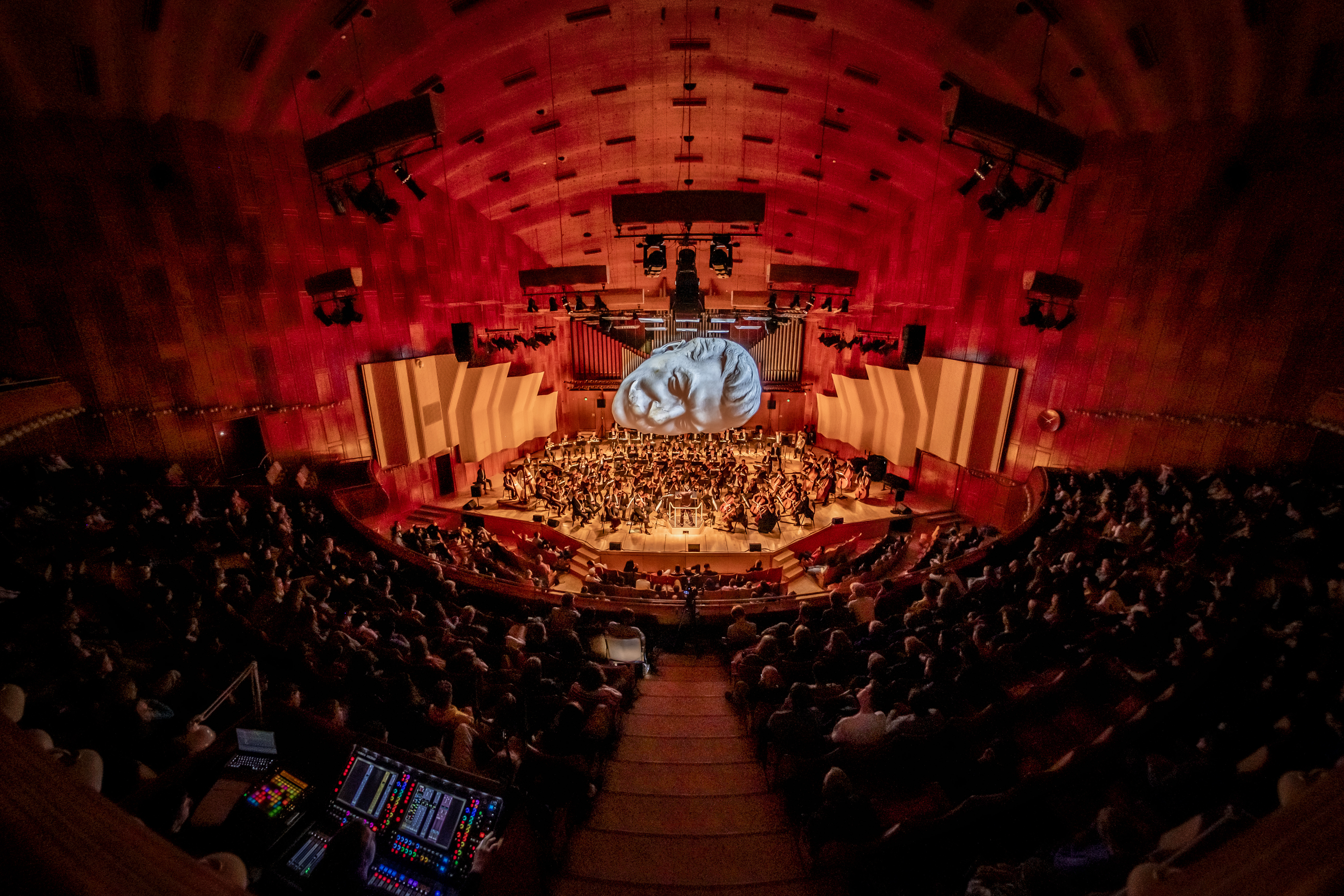 Copenhagen Phils koncertforestilling "Afgørende øjeblikke"